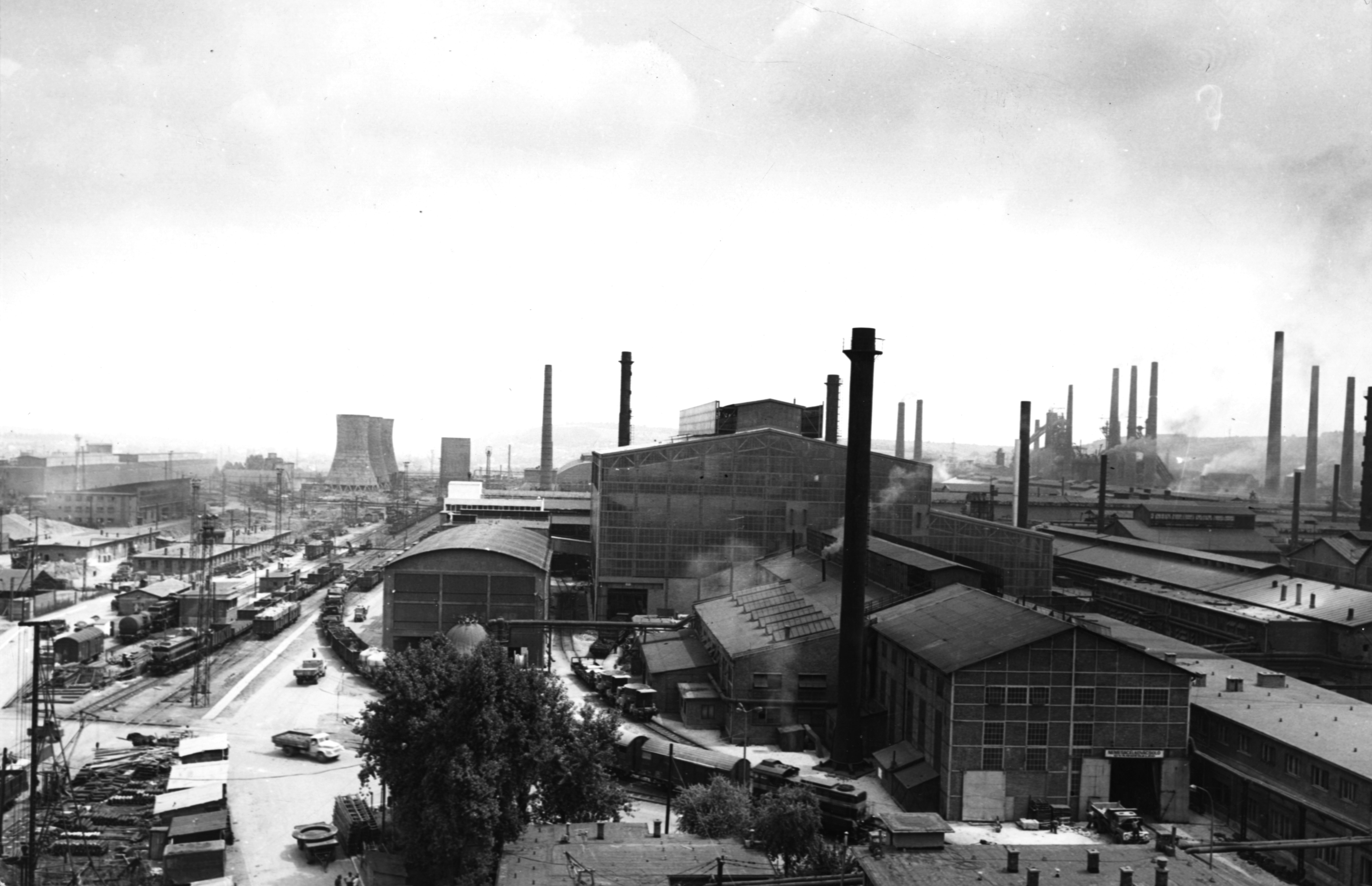 Lenin Kohászati Művek. Location: Hungary, Diósgyőr Tags: factory, factory chimney, railway Title: Lenin Kohászati Művek.